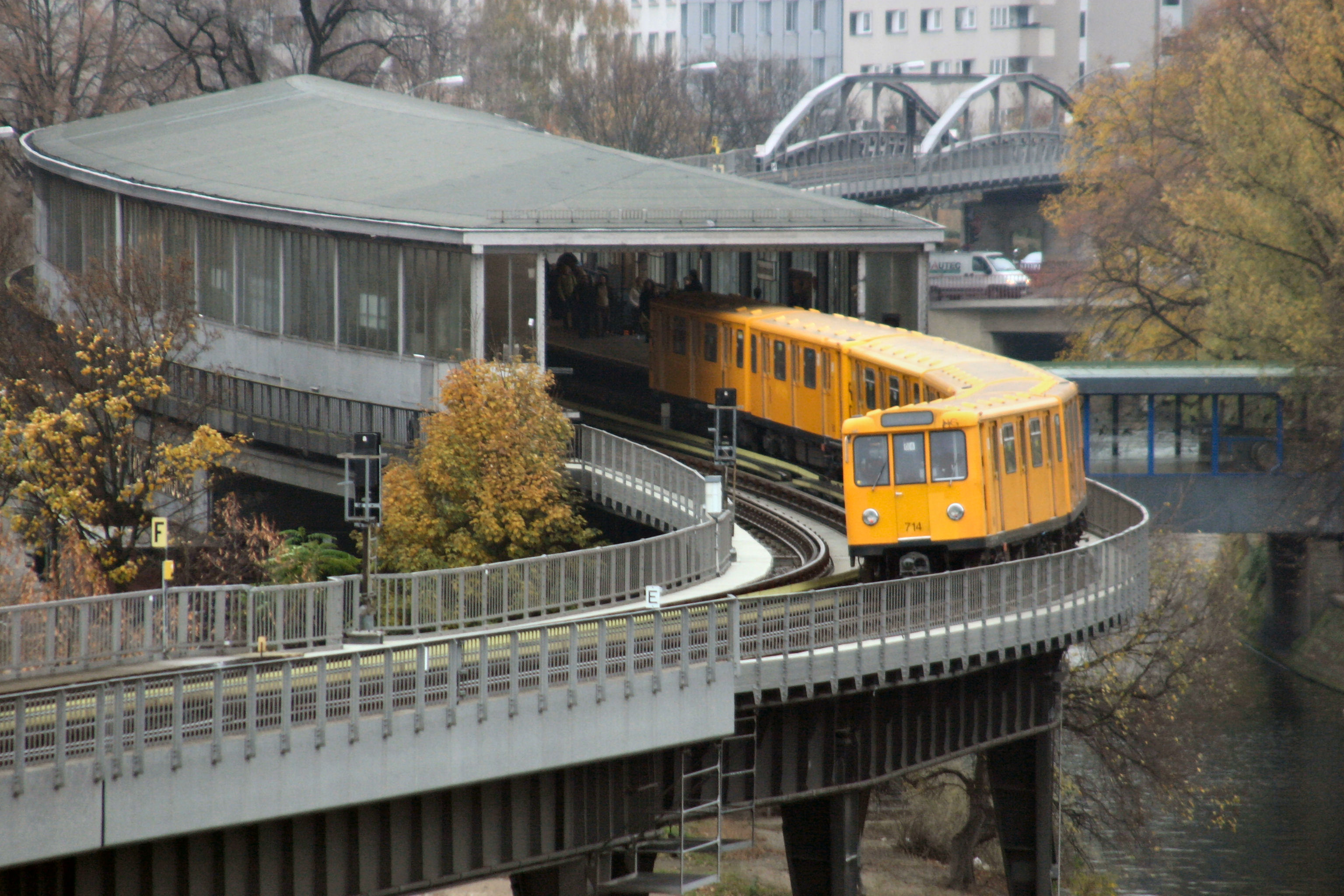 A train entering Möckernbrücke station, Berlin U-Bahn